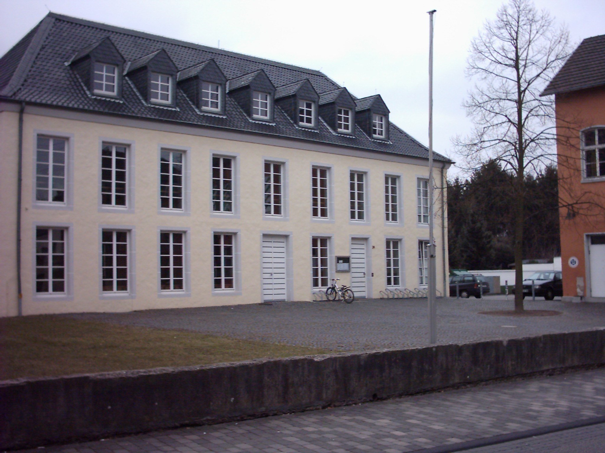 Alte Niedermendener Burg in Sankt Augustin-Menden